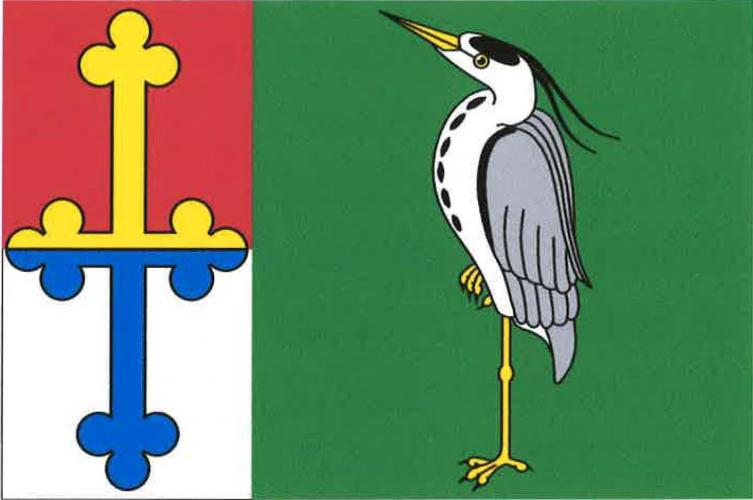 Volevčice, okres Most, vlajka